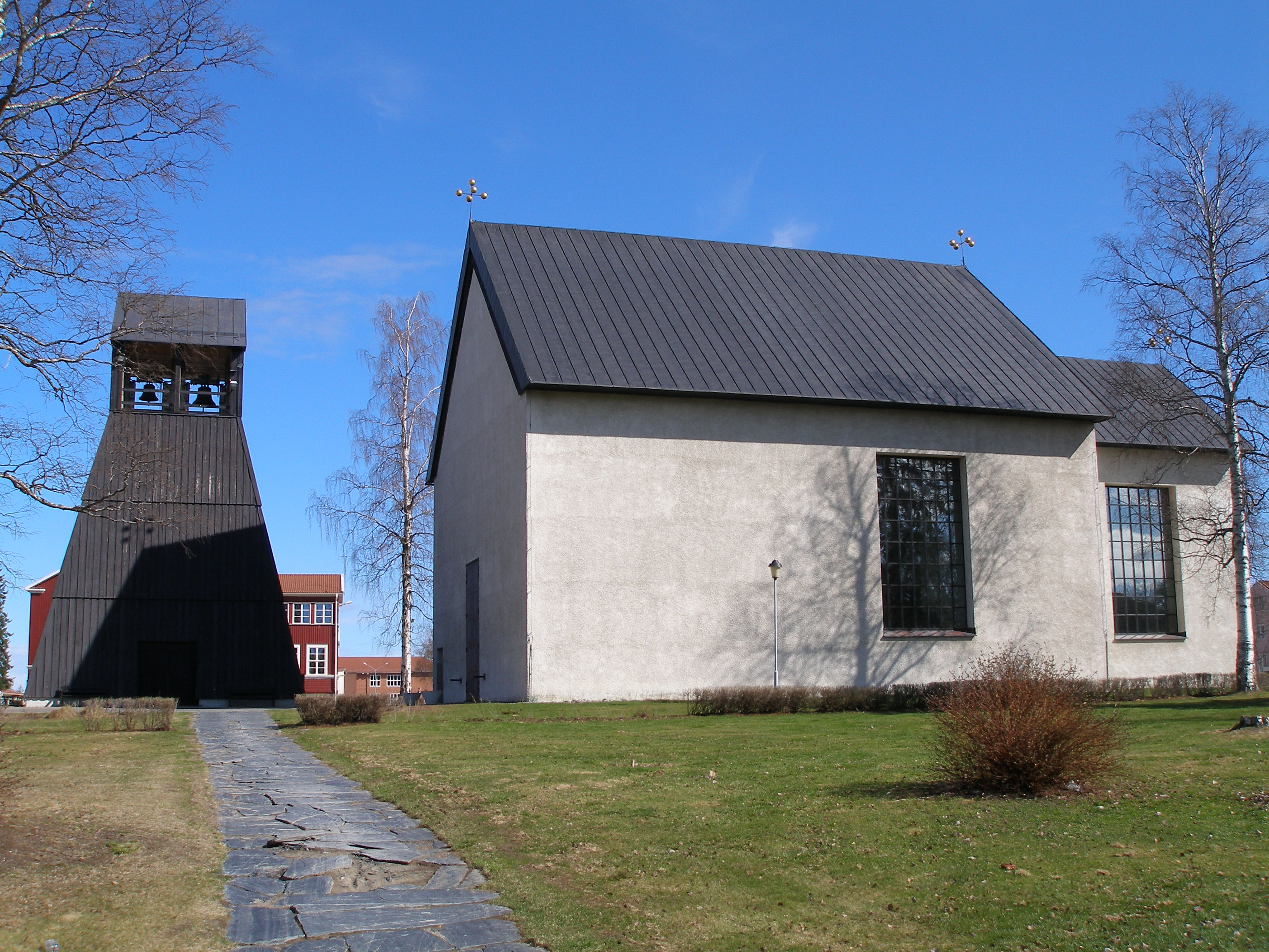 Bolidens kyrka med vidstående klocktorn. Boliden, Skellefteå kommun.